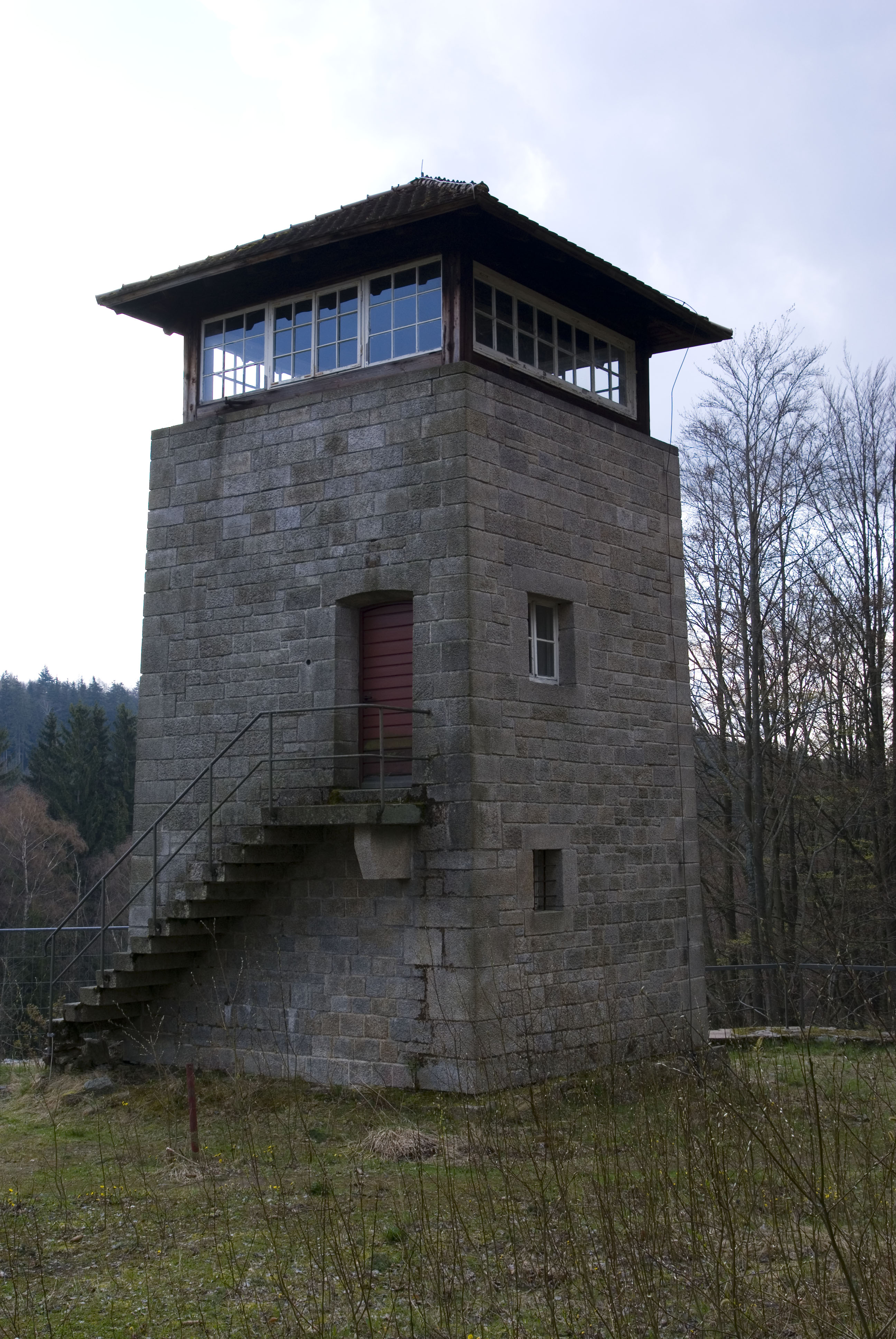 Wachturm im KZ Flossenbürg, Germany